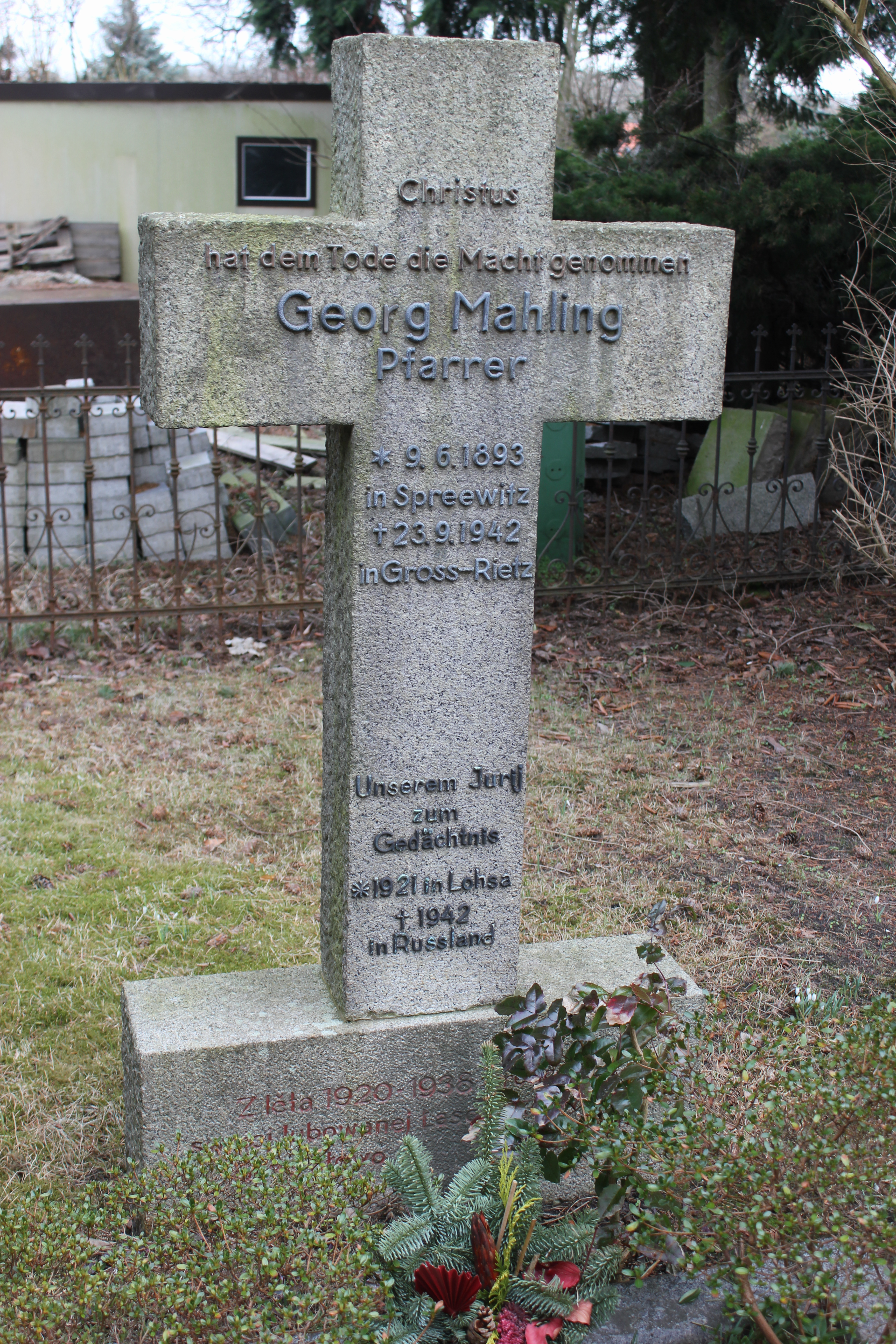 Hornjoserbsce: Narowny kamjeń Jurja Malinka na Łazowskim kěrchowje ze serbskim napisom při delnim dźělu.